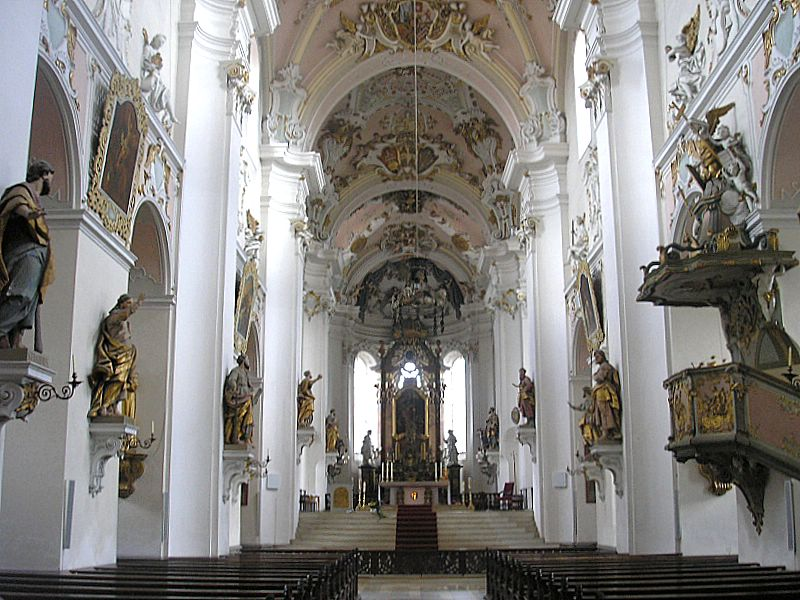 Ehemalige Stiftskirche St. Vitus (Ellwangen a.d. Jagst, BW). Innenraum nach Osten. Eigene Aufnahme, Aug. 2006 / St. Vitus, Ellwangen a.d. Jagst, Baden-Wuerttemberg, Germany. The nave to the east. Own photo, Aug. 2006